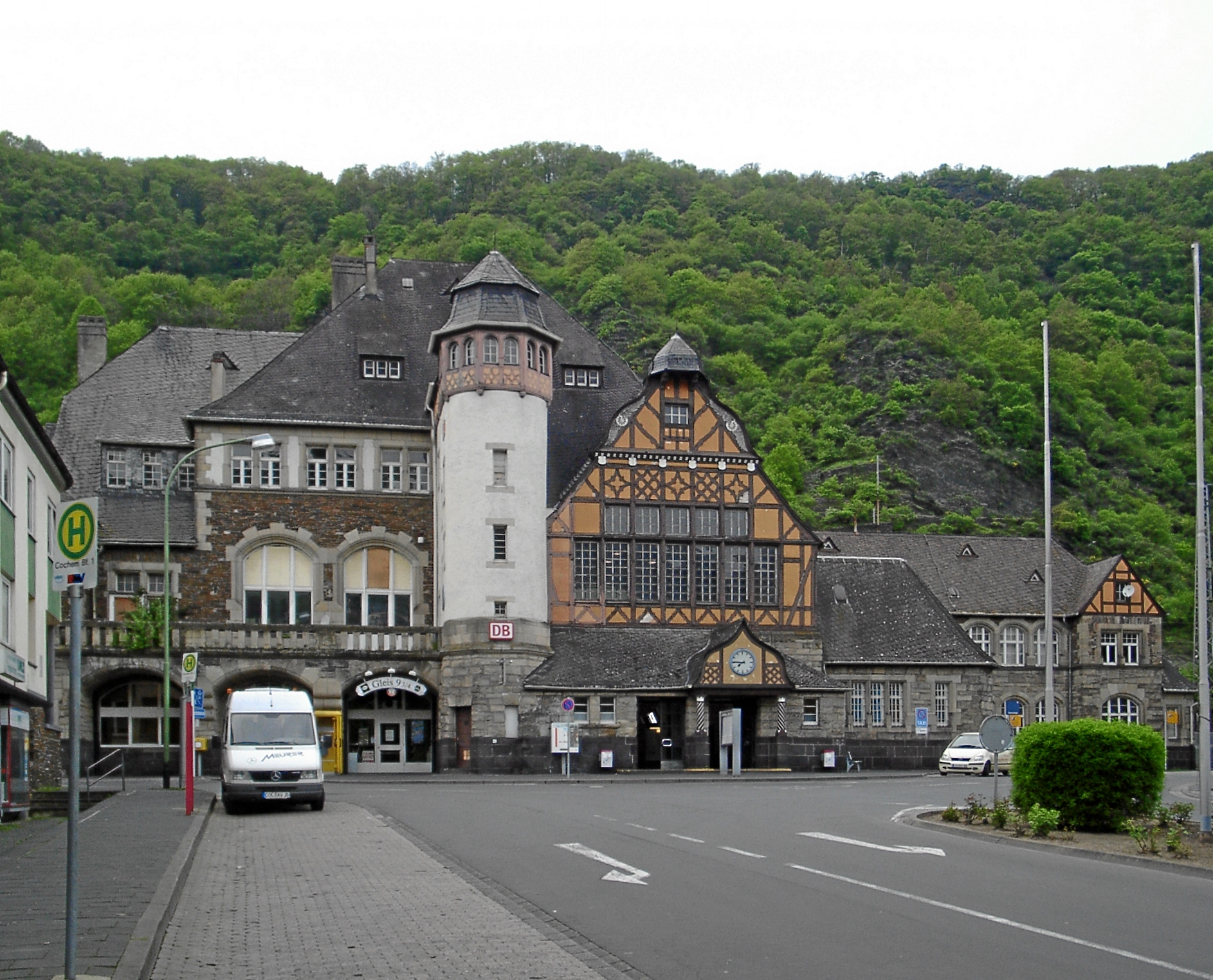 Bahnhof Cochem